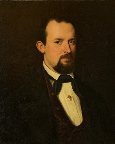 Il tenore Settimio Malvezzi, olio su tela, cm 65 x 53, firmato, coll. privata